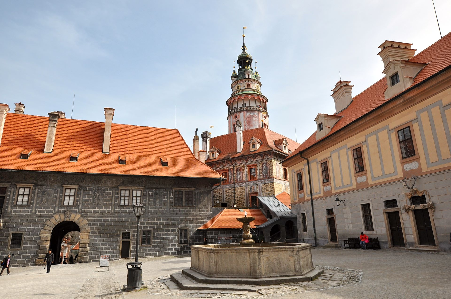 Cesky Krumlov